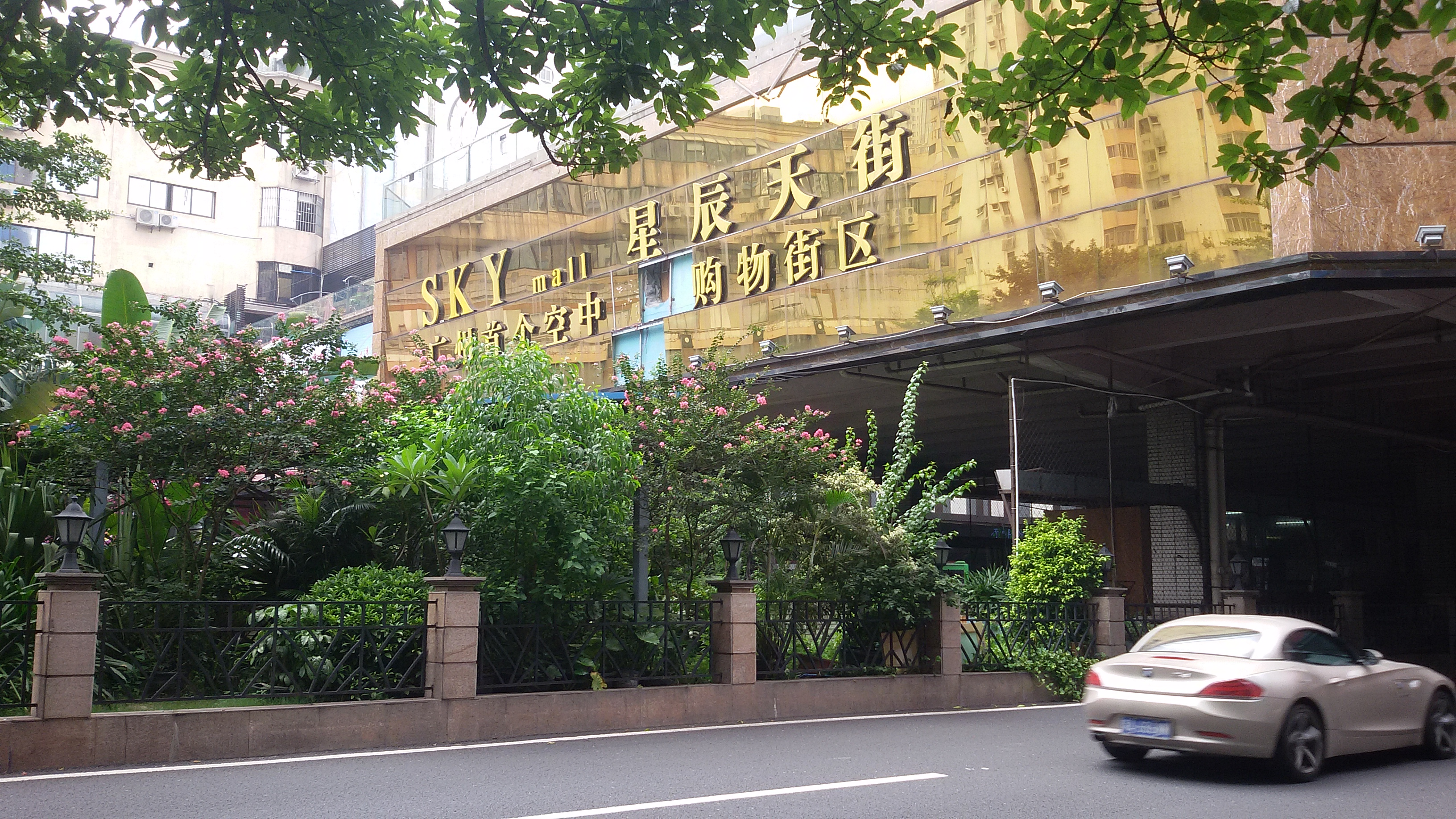 粵語: 星辰天街